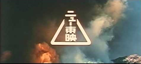 ニュー東映、1961年、カットタイトル(トップロゴ)。